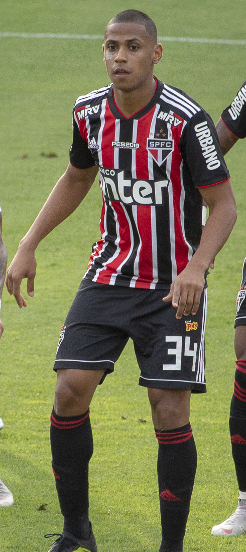 Foto: Douglas Teixeira/Futebol Santista